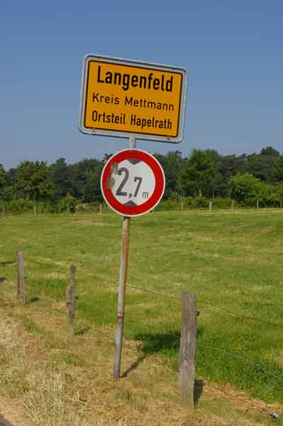 Einziges Ortseingangsschild nach Hapelrath